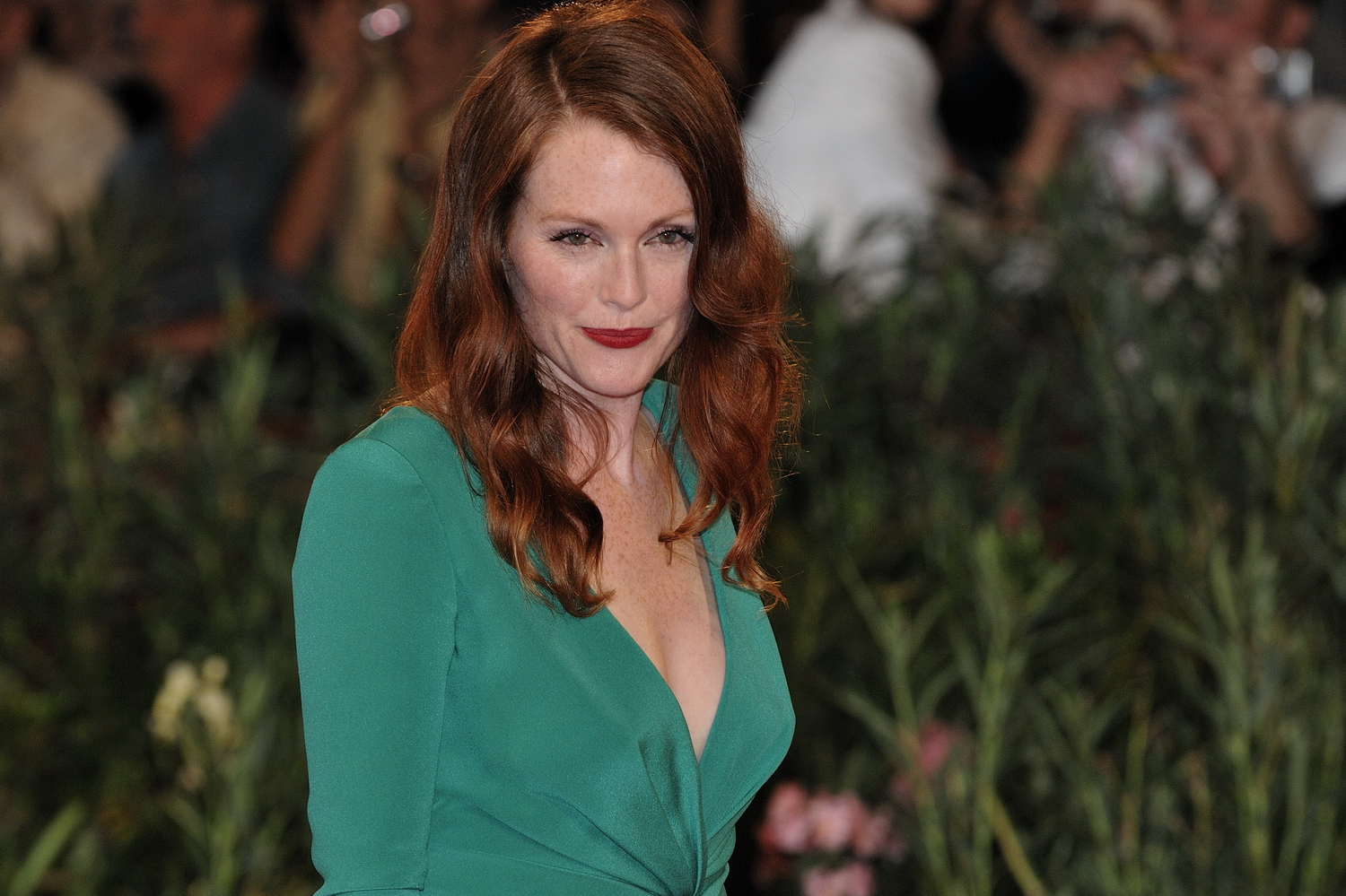 66ème Festival du Cinéma de Venise (Mostra), 10ème jour (11/09/2009) Tapis rouge avec Colin Firth, Julianne Moore, Matthew Goode et le réalisateur Tom Ford pour le film : A sigle Man